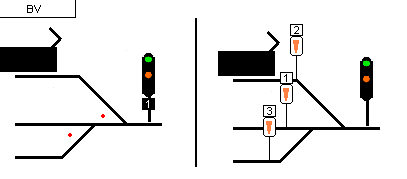 Exemple de possibilités de signalisation complémentaire pour signaux de groupe.